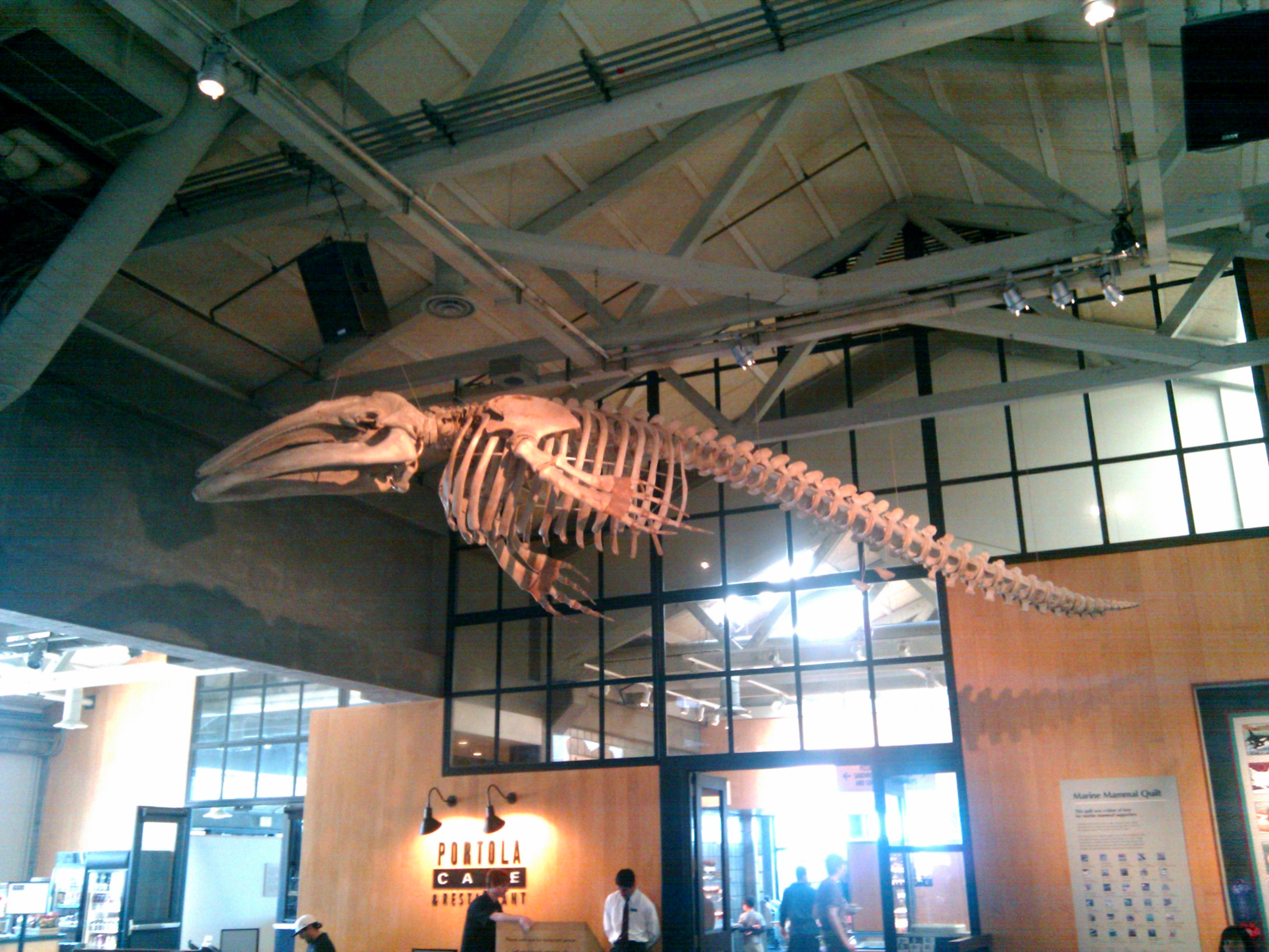 Monterey whale skeleton